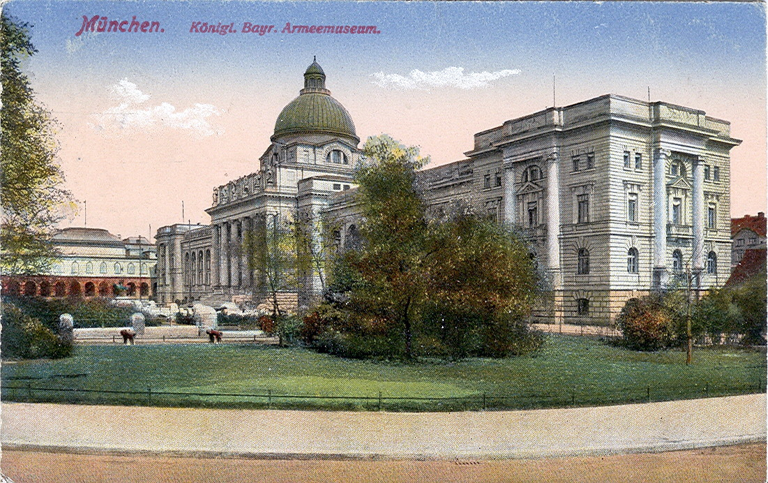 Postkarte, datiert 6.4.1918. Beschriftung: "München - Königlich Bayrisches Armeemuseum."